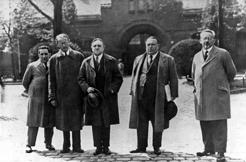 [Text der Fotoagentur Heinz-Ulrich Röhnert:] Foto Röhnert Ossietzky, Carl von Am 10.Mai 1932 trat der Schriftsteller und Redakteur der "Weltbühne", Carl von Ossietzky, seine Gefängnisstrafe, zu der er im November 1931 verurteilt worden war, in Tegel an. [ADN-Text:] ADN-ZB Carl von Ossietzky, Publizist, Vor der Strafanstalt in Berlin -Tegel. V.l.n.r.: Kurt Grossmann, Dr. Rudolf Olden, beide Deutsche Liga für Menschenrechte; Carl von Ossietzky, Dr. Alfred Apfel, Rechtsanwalt; Dr. Kurt Rosenfeld